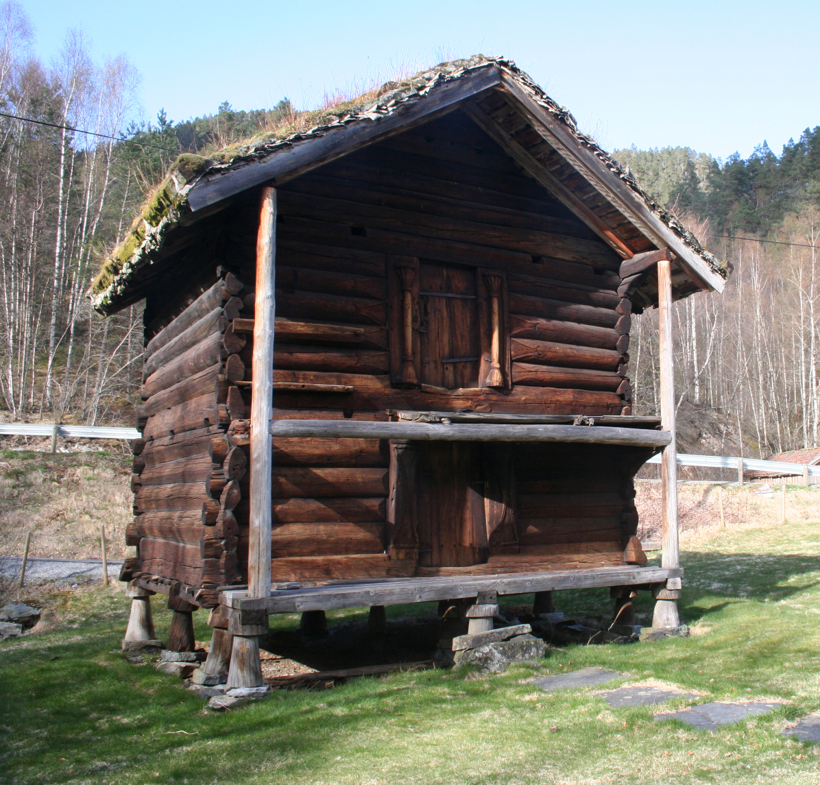 Kolbeinstveit Guggedalsloft